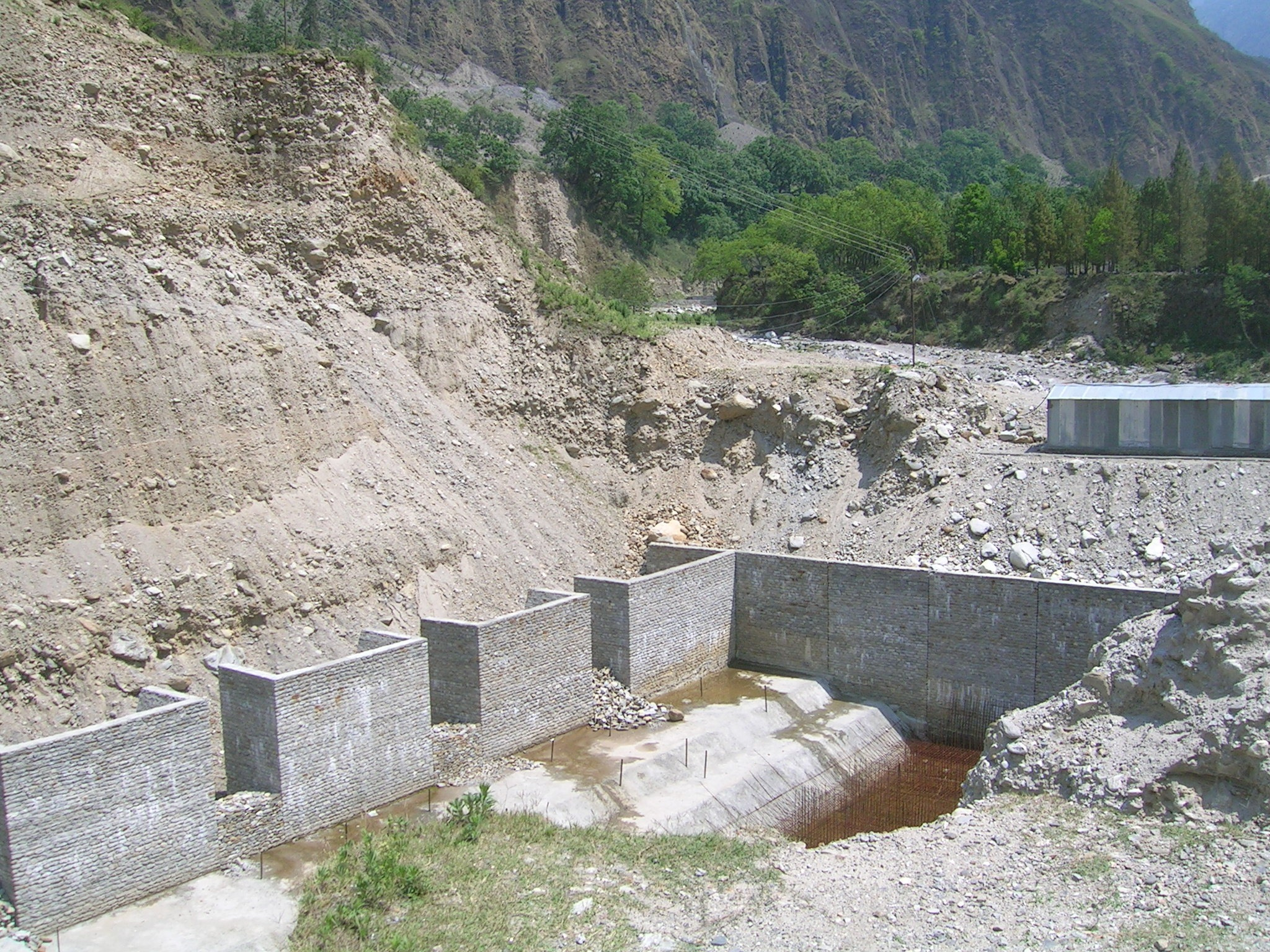 Madkote dam, Uttarakhand